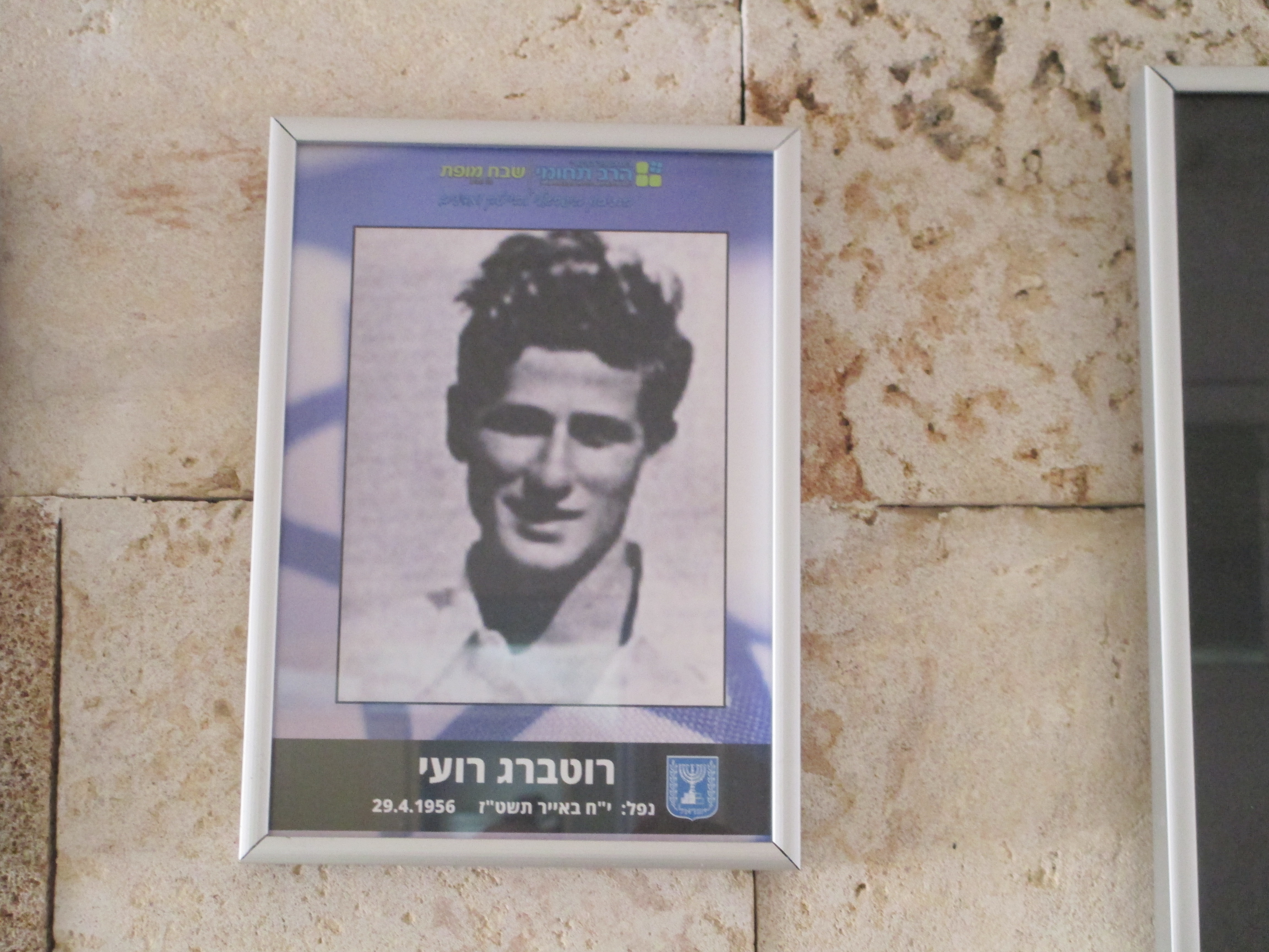 תמונת רועי רוטברג בפינת ההנצחה לבוגרי בית הספר שבח שנפלו במערכות ישראל